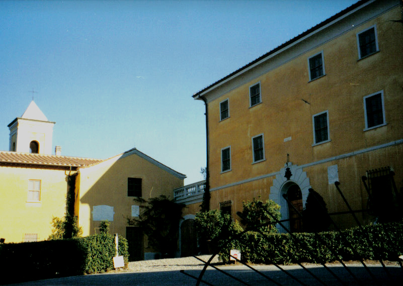 Villa Granducale di Alberese (GR)